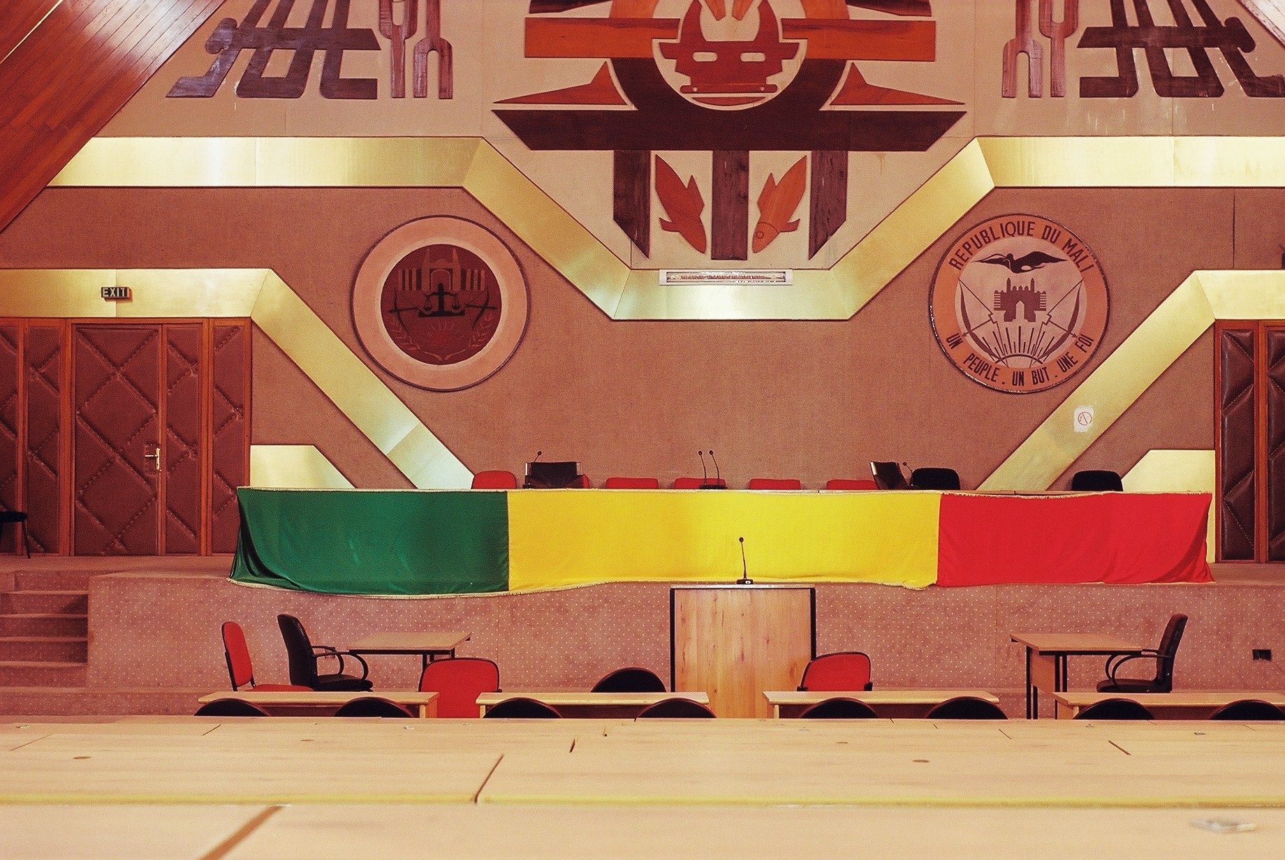 Vue de l'estrade de l'assemblée nationale du Mali